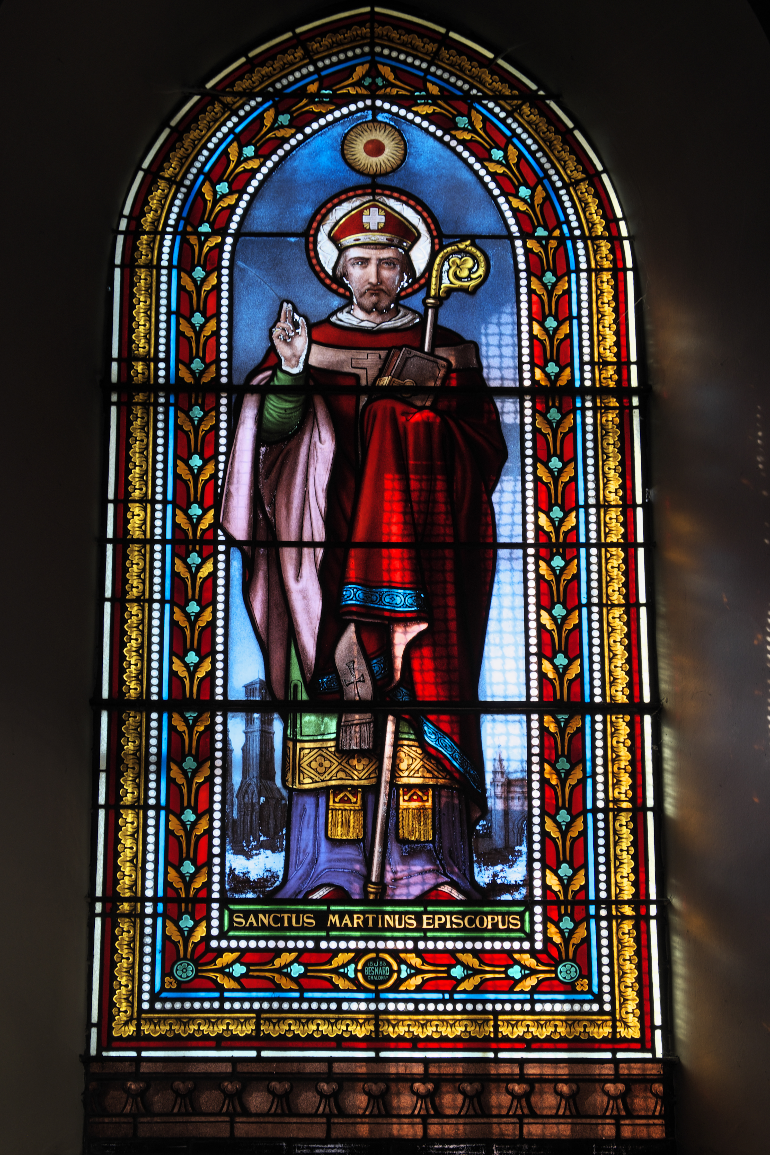 Katholische Kirche Saint-Martin in Auxey-Duresses im Département Côte-d’Or (Bourgogne-Franche-Comté/Frankreich), Bleiglasfenster mit der Signatur: J BESNARD 1888 CHALON s/S; Darstellung: Heiliger Martin